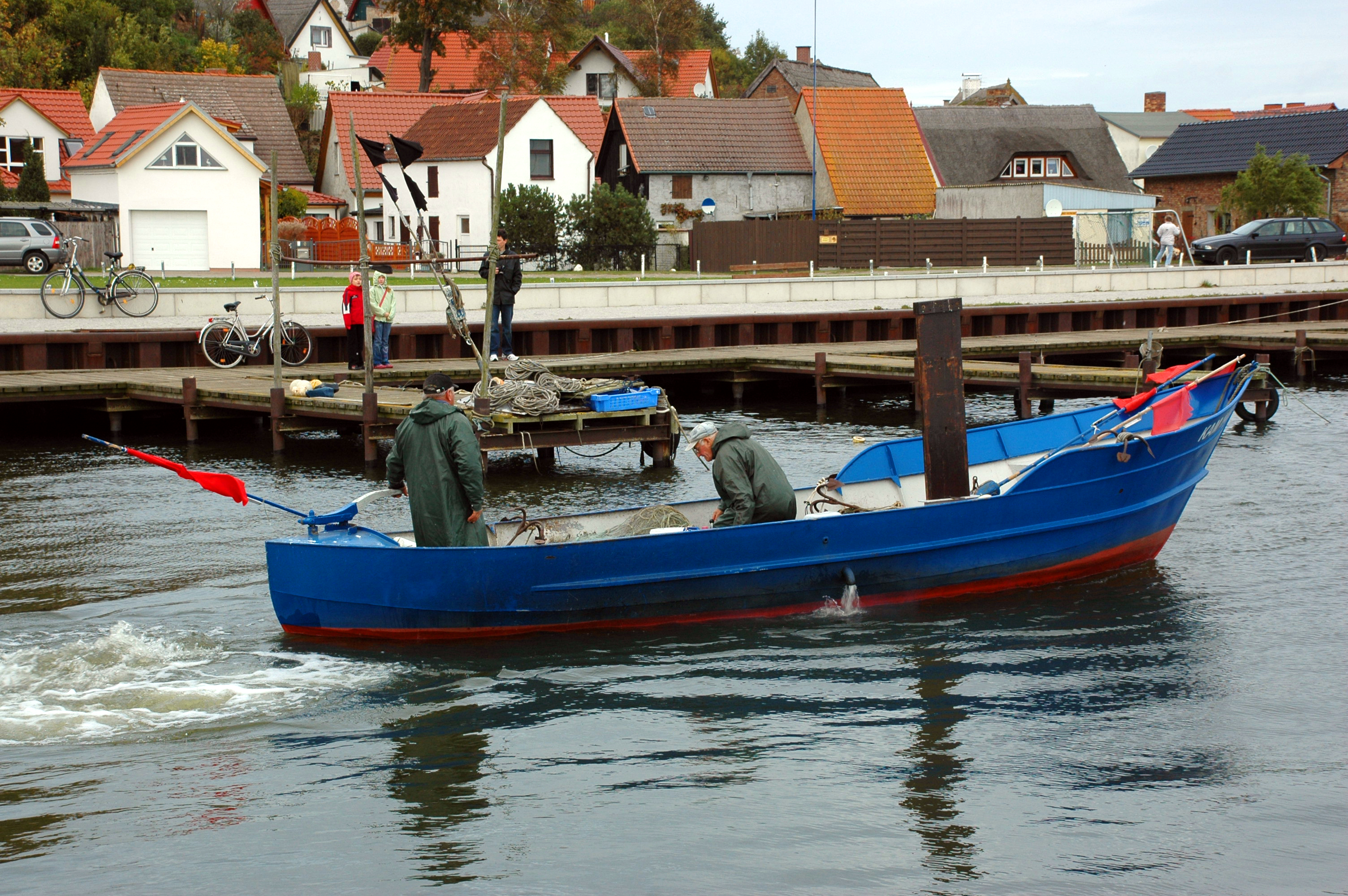 Przystań rybacka w Kamminke